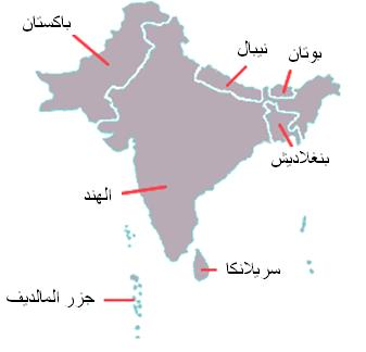 Pays faisant partie de l'ASACR, ce qui n a pas toujours été historiquement prouvé.